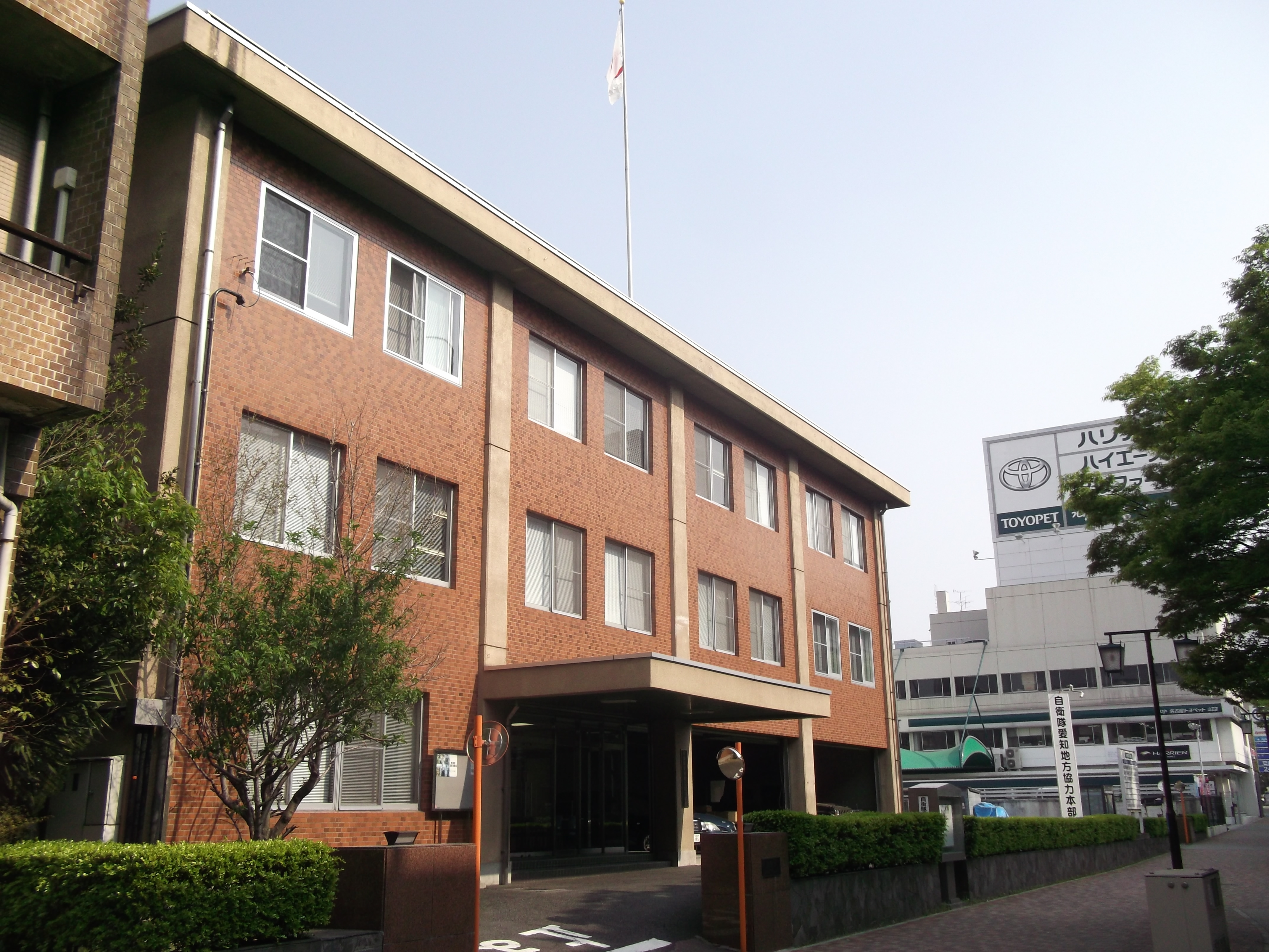 名古屋市中川区松重町の自衛隊愛知地方協力本部を西側公道北側より撮影